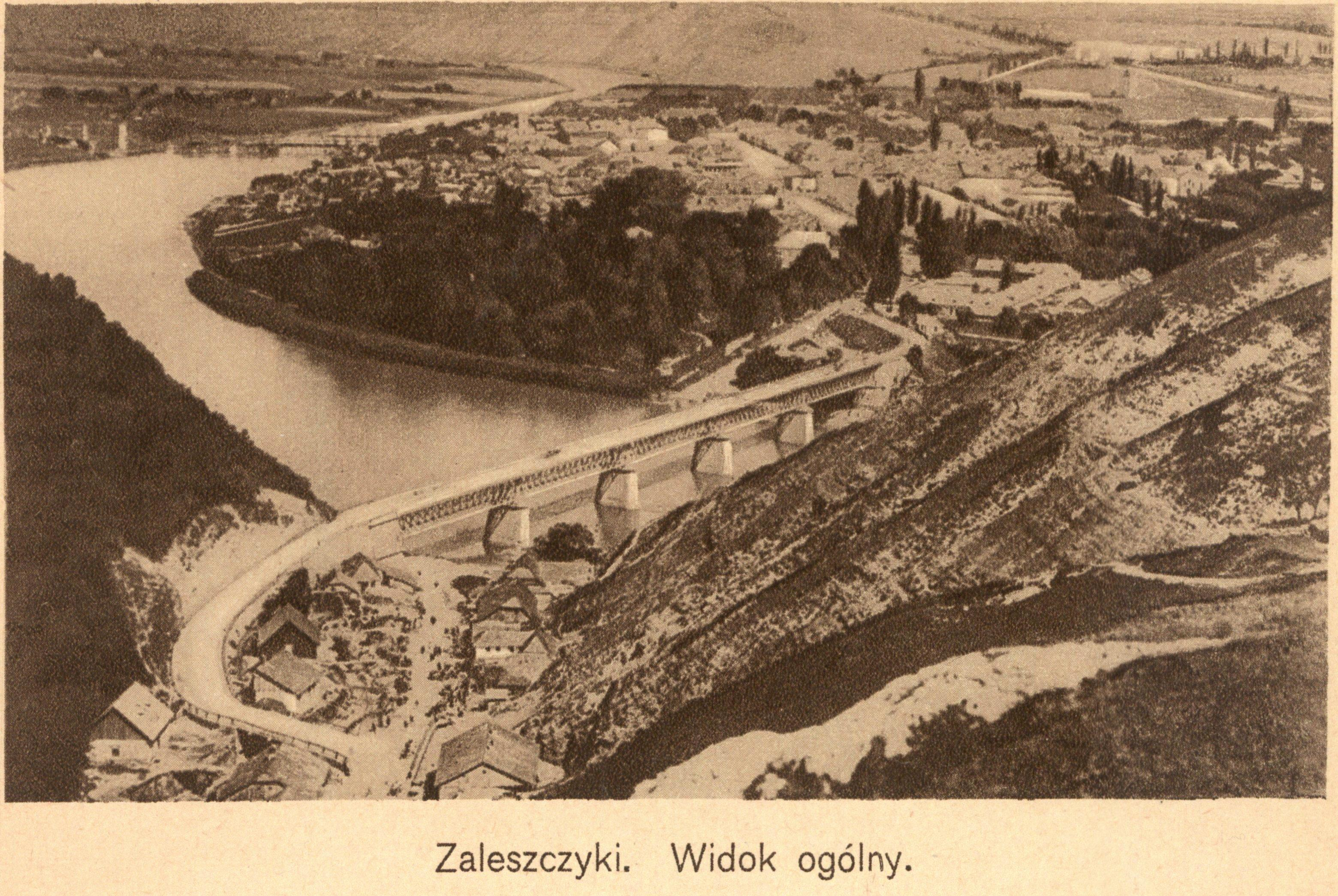 Заліщики на початку ХХ ст.